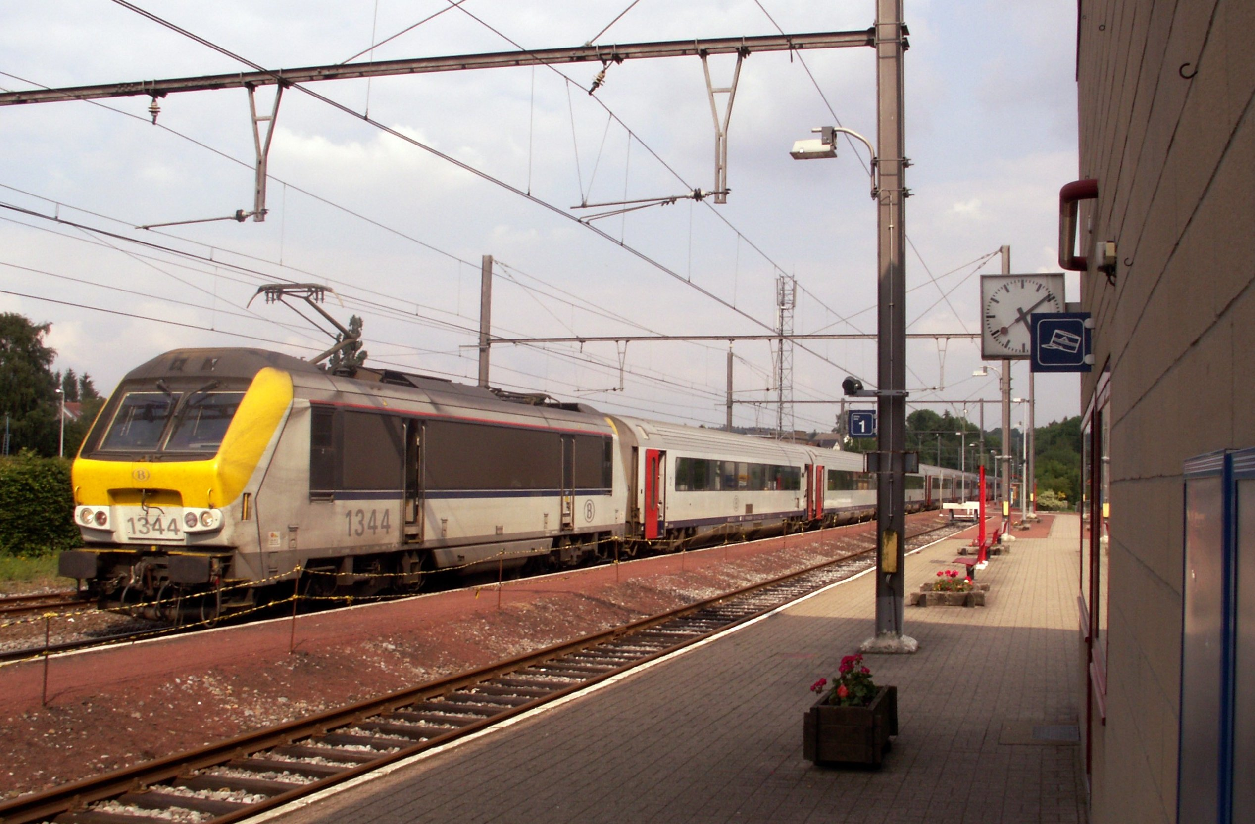 Linie 37, Bahnhof Eupen/Ligne 37, Gare d'Eupen